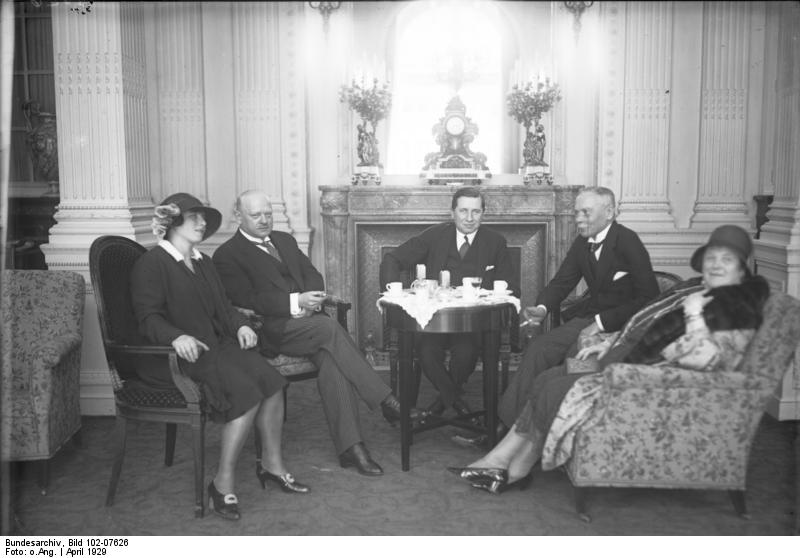 Die Vermählung des österreichischen Gesandten in Berlin Dr. Felix Frank mit der Wiener Pianisten Magarethe Witt! Das Hochzeitspaar mit den Trauzeugen, Reichsaussenminister Dr. [Gustav] Stresemann und General [Hans] von Seeckt nach der Trauung im Hotel Adlon in Berlin, von links nach rechts: die Gattin des österreichischen Gesandten in Berlin, Reichsaussenminister Dr. Stresemann, der österreichische Gesandte Dr. Felix Frank, General von Seeckt und dessen Gattin.